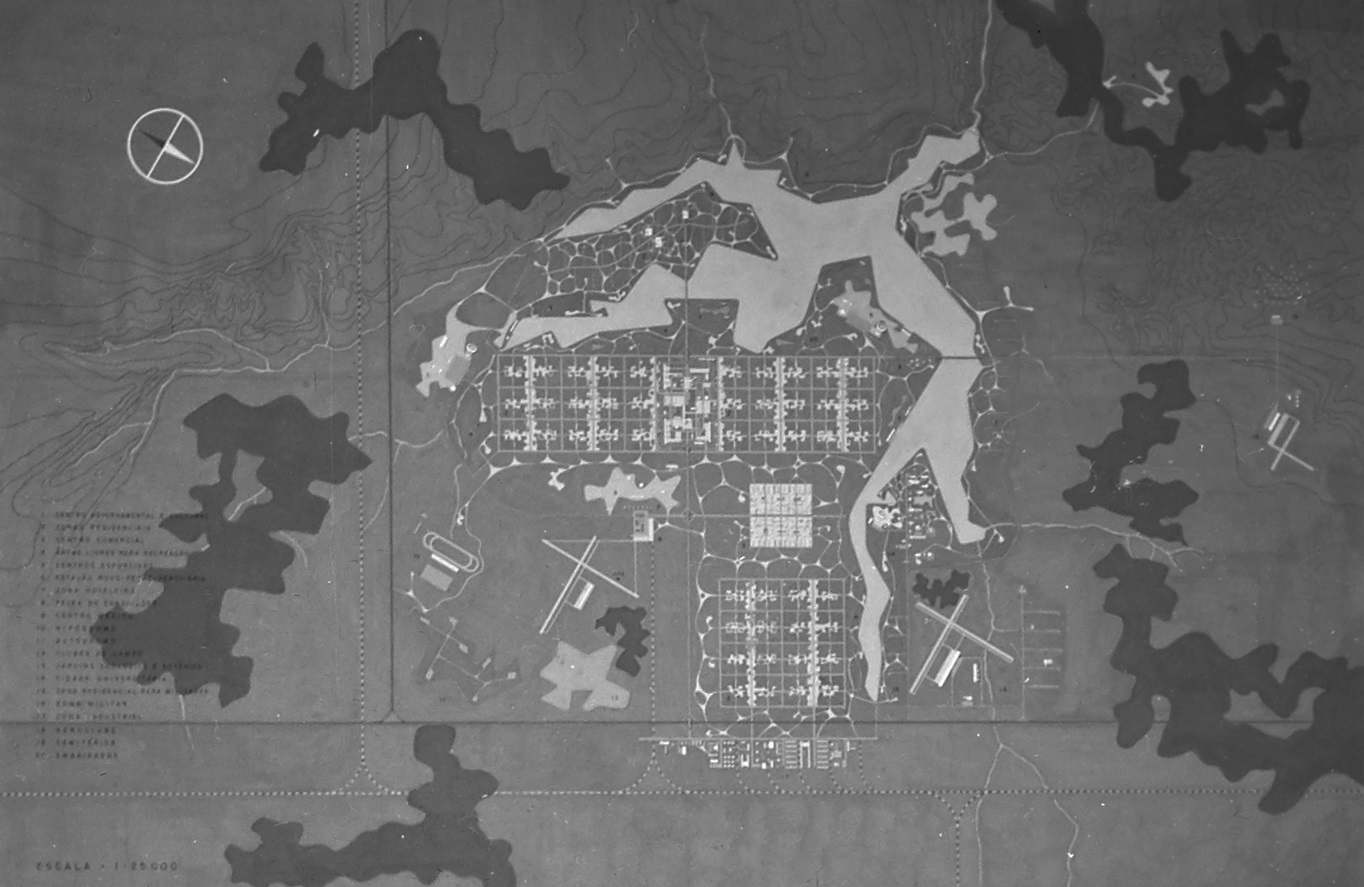 Imagem do Fundo Agência Nacional, do Arquivo Nacional